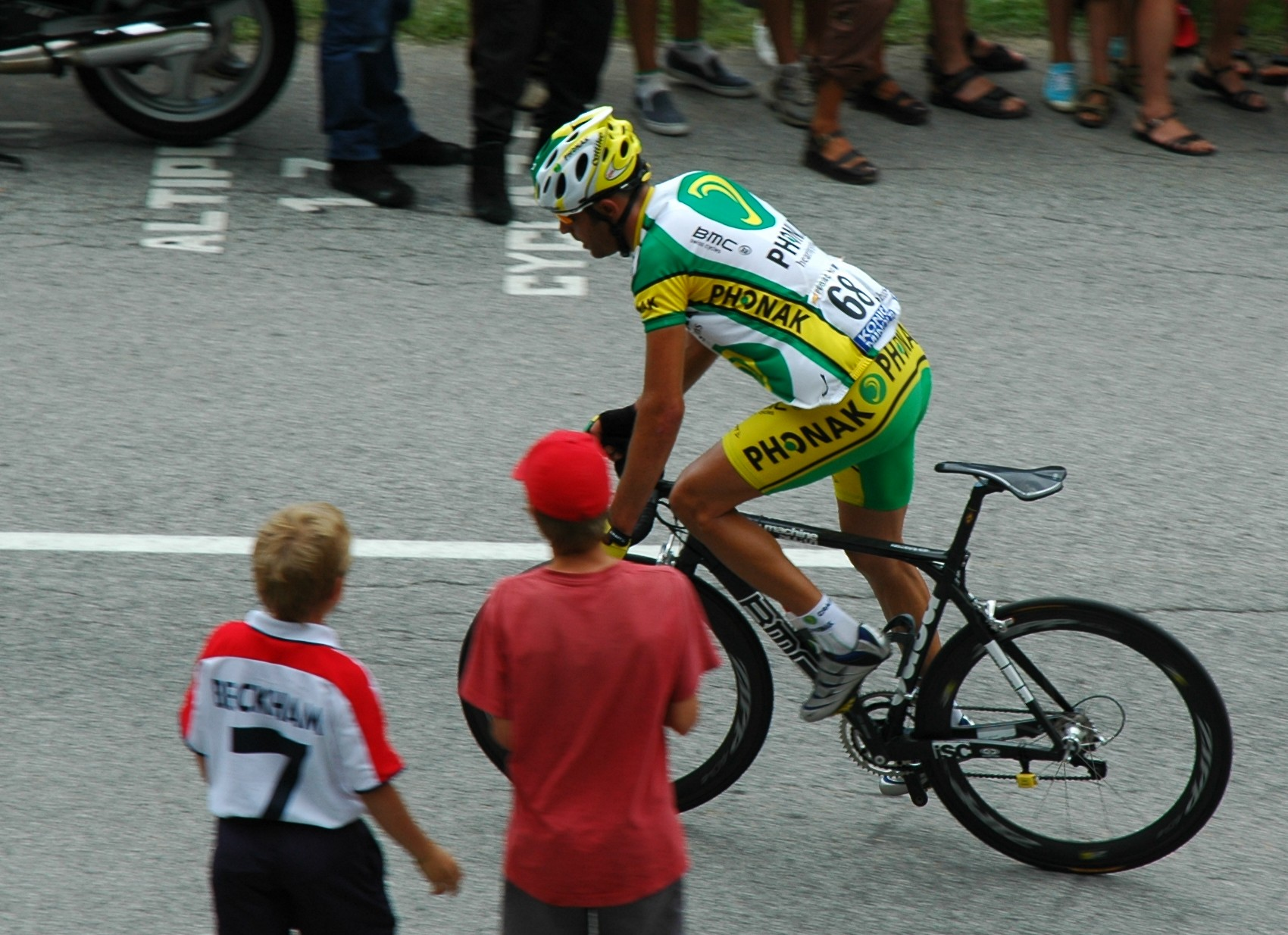 Óscar Pereiro, Tour de France 2005.